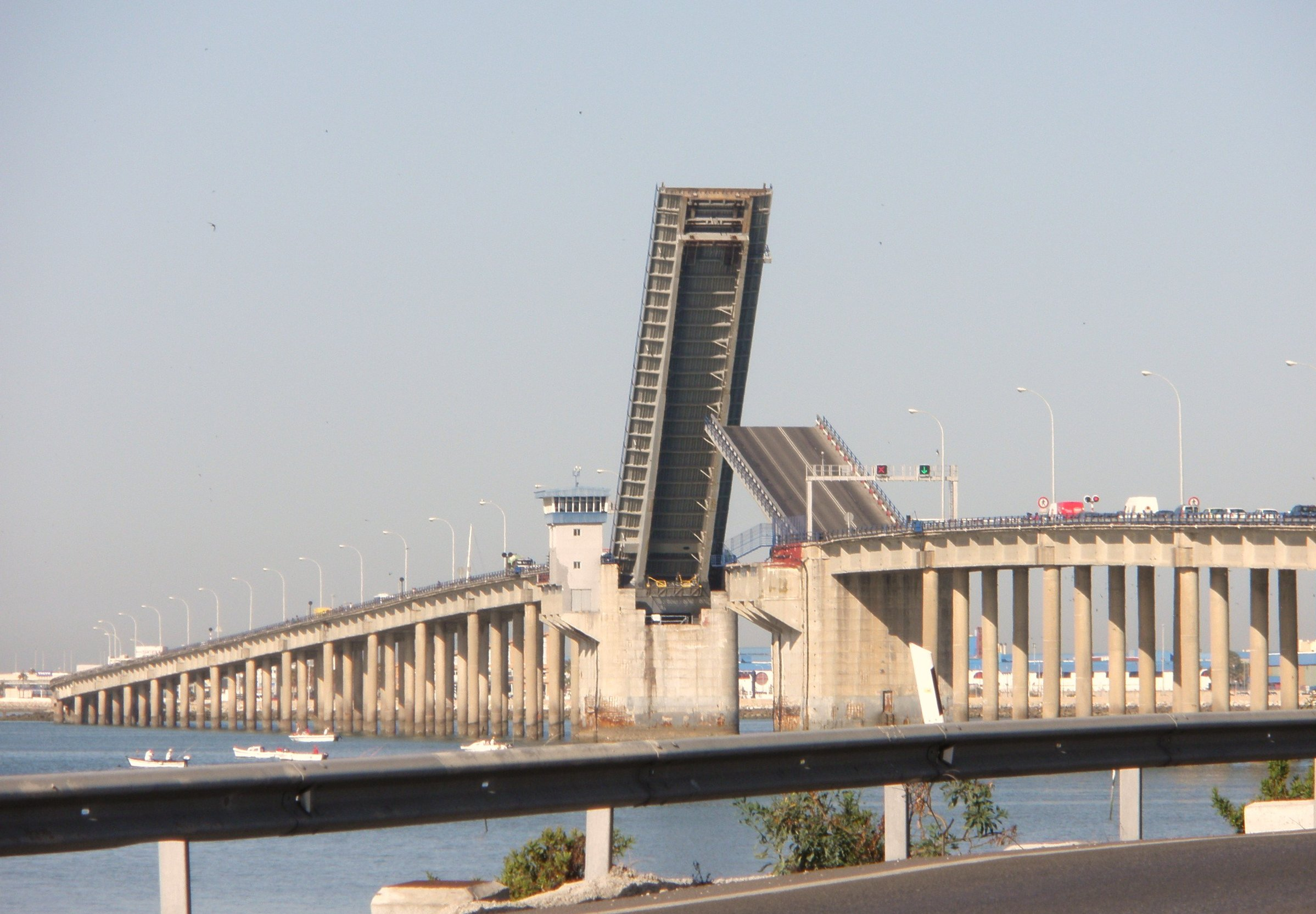 Puente José León de Carranza abierto para el paso de un barco.